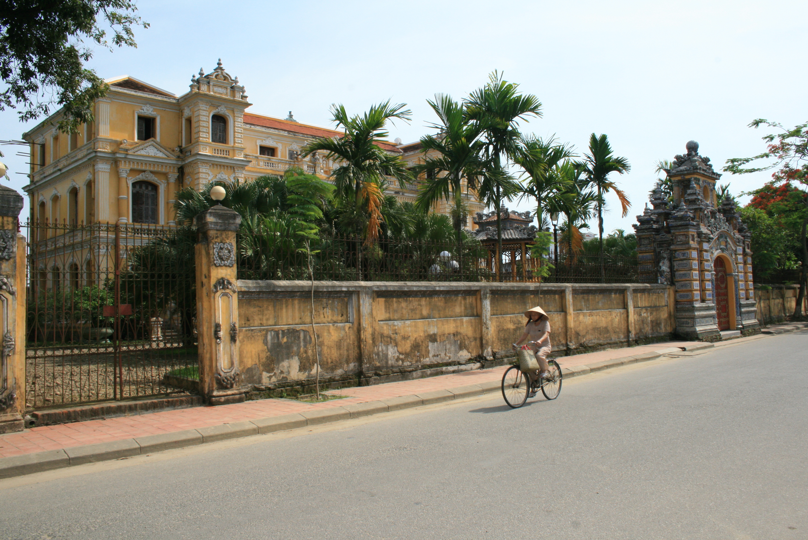 An Dinh Residence, Hue, Vietnam